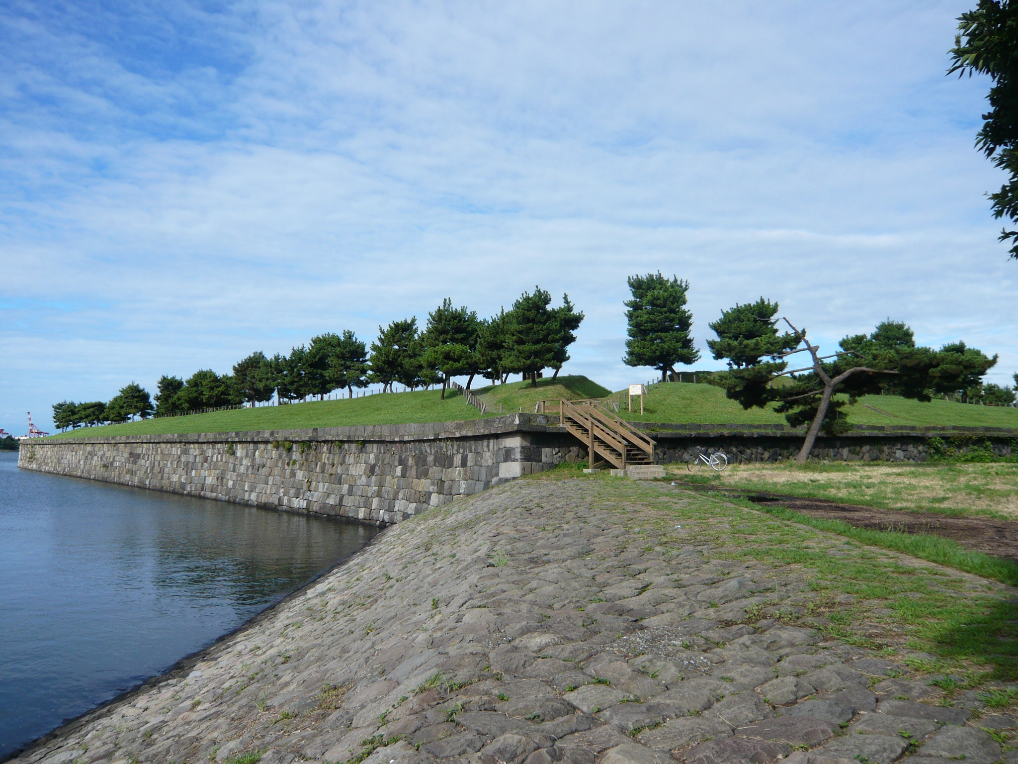 台場公園（東京都港区台場(お台場)） Daiba Park(Daiba-kouen,台場公園) in odaiba,Tokyo,Japan.